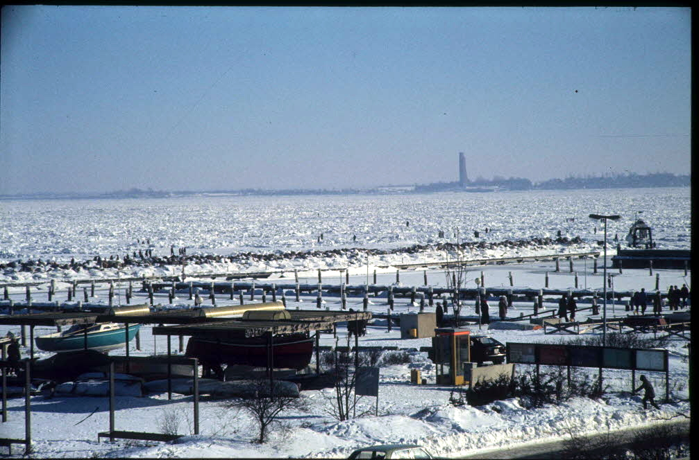 Vereiste Förde vor Schilksee.